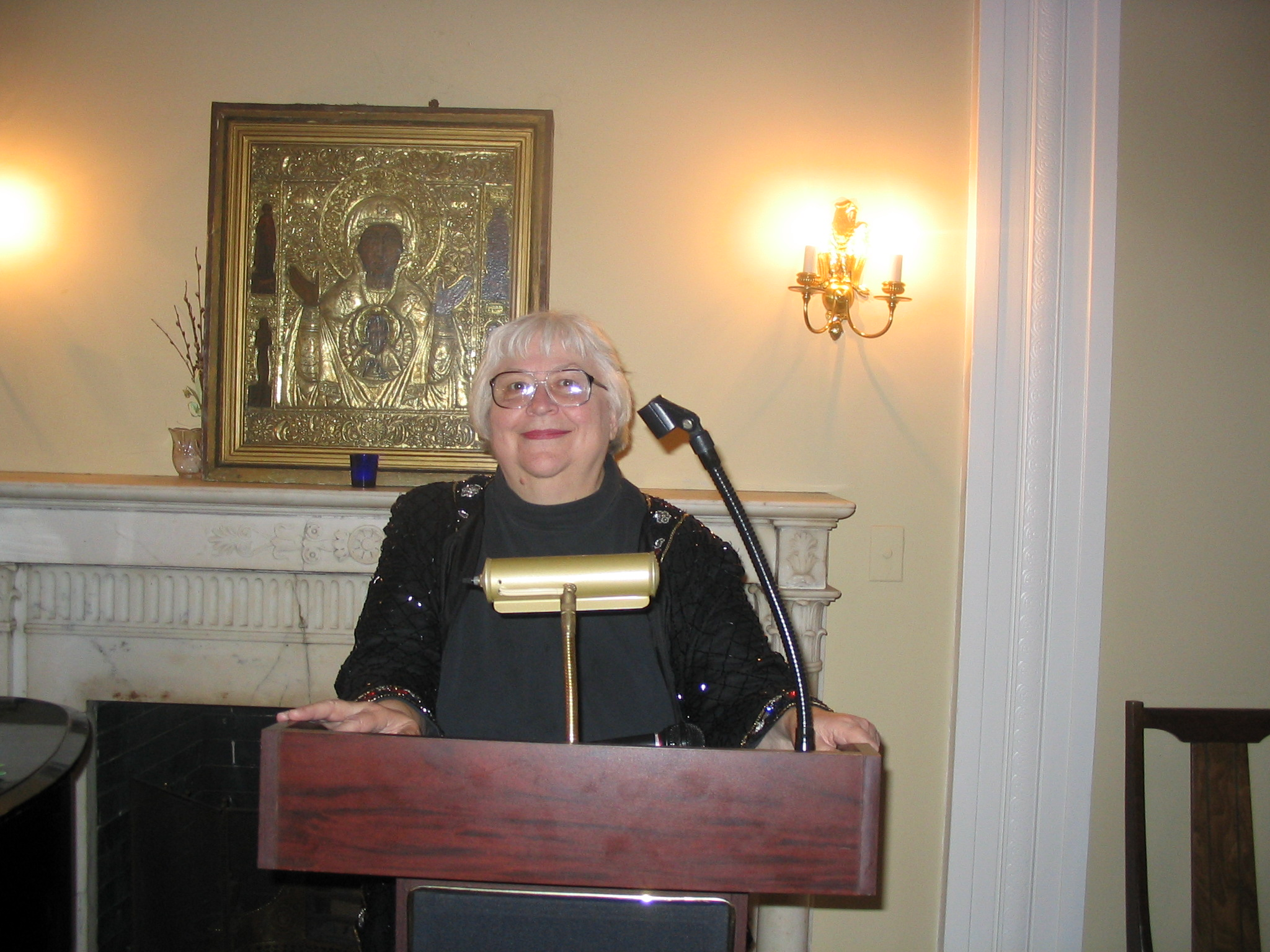 Вице-президент — Елена фон Тизегаузен